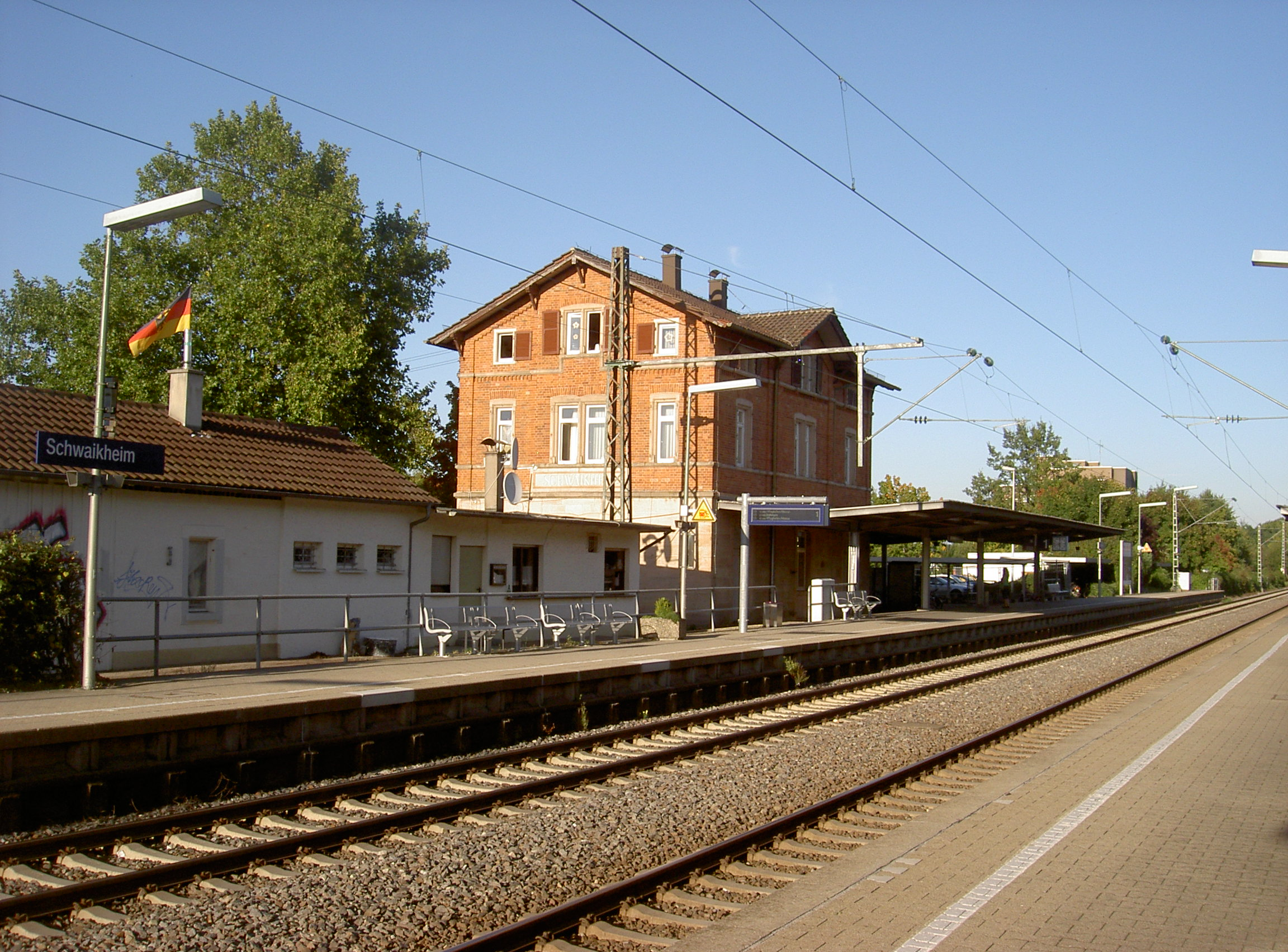 Haltepunkt Schwaikheim